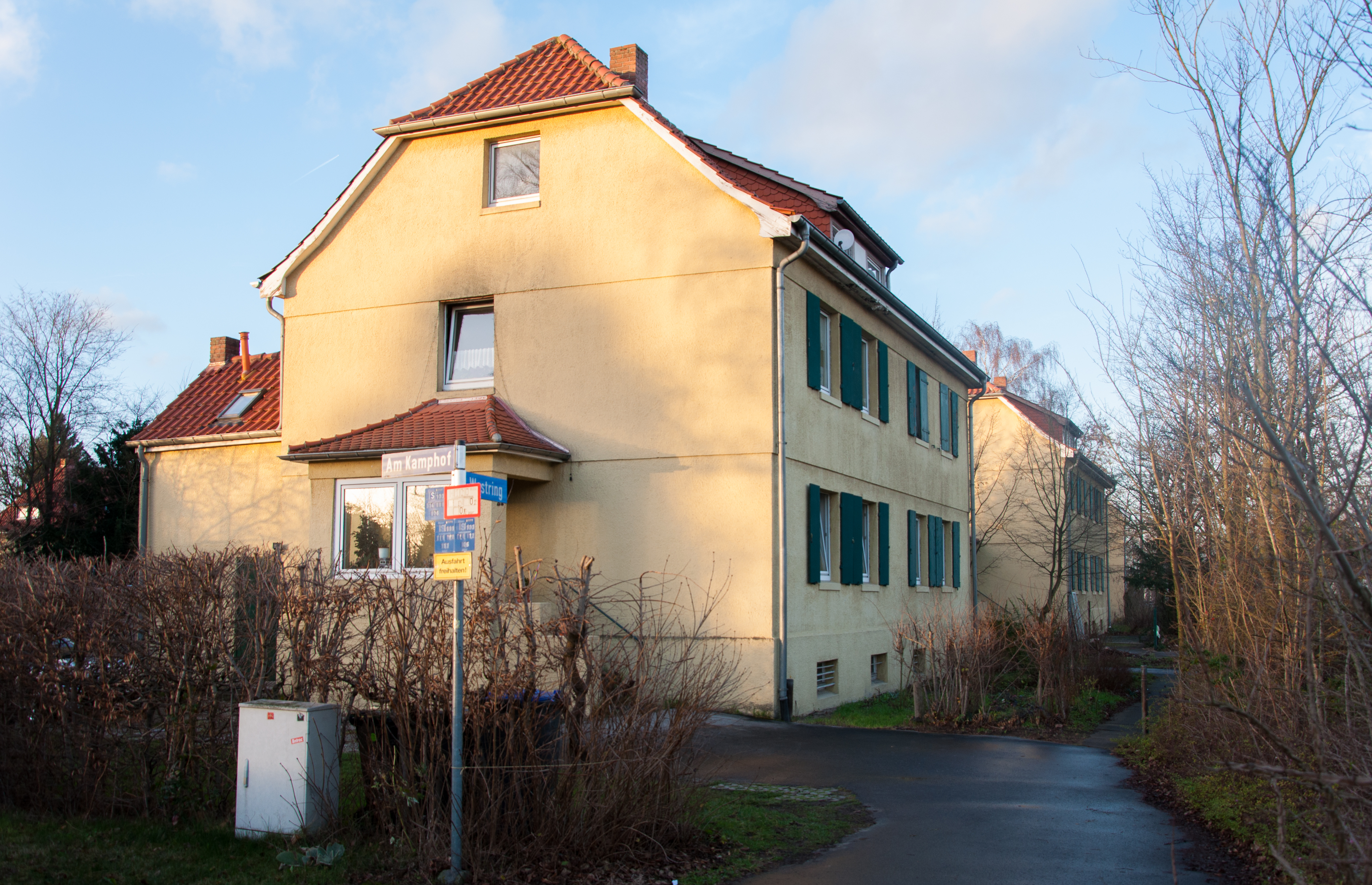 Haus Am Kamphof Gütersloh, Teil des Denkmalensembles "Am Kamphof"